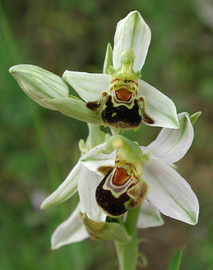 Bienen-Ragwurz (Ophrys apifera)